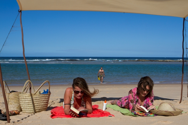 La plage aux dunes de Dovela